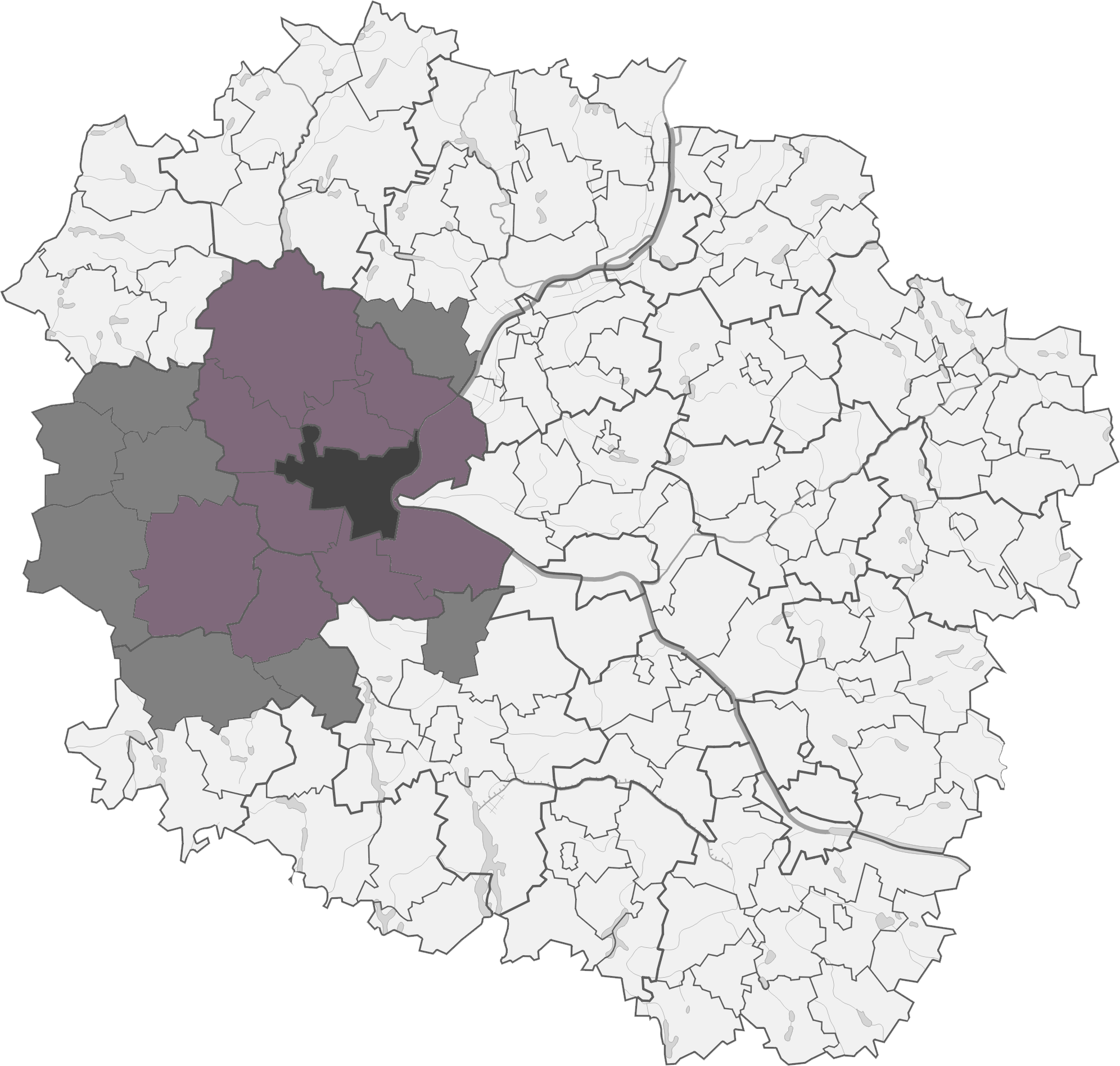 Mapa gmin województwa kujawsko-pomorskiego. Zaznaczone są gminy: m. Bydgoszcz (kolor ciemnoszary) + gminy wchodzące w skład stowarzyszenia Metropolia Bydgoszcz (kolor szary) + gminy wchodzące w skład Bydgoskiego Obszaru Funkcjonalnego i jednocześnie ww. stowarzyszenia (kolor ciemny liliowy).